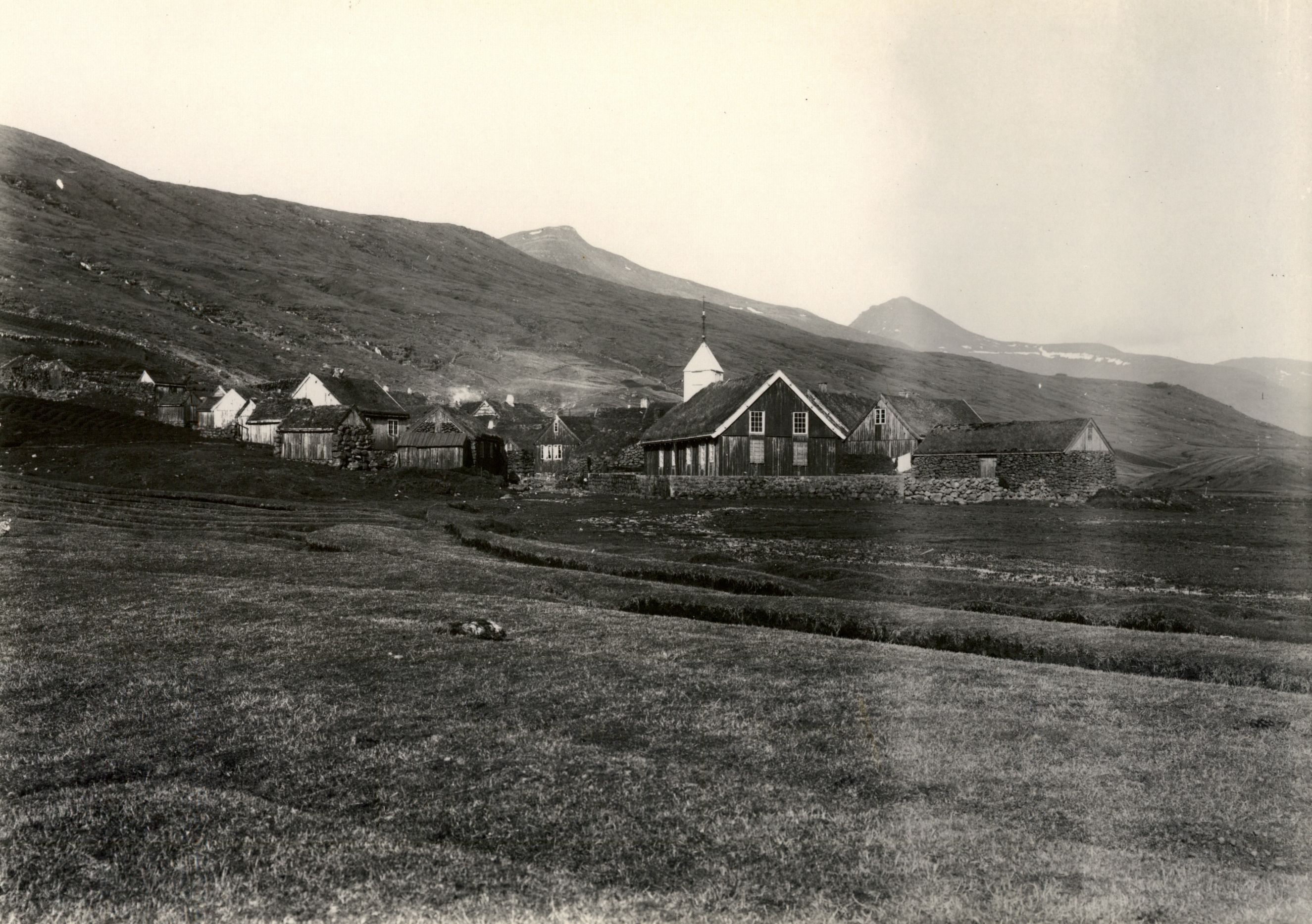 Hvalvík, Faroe Islands